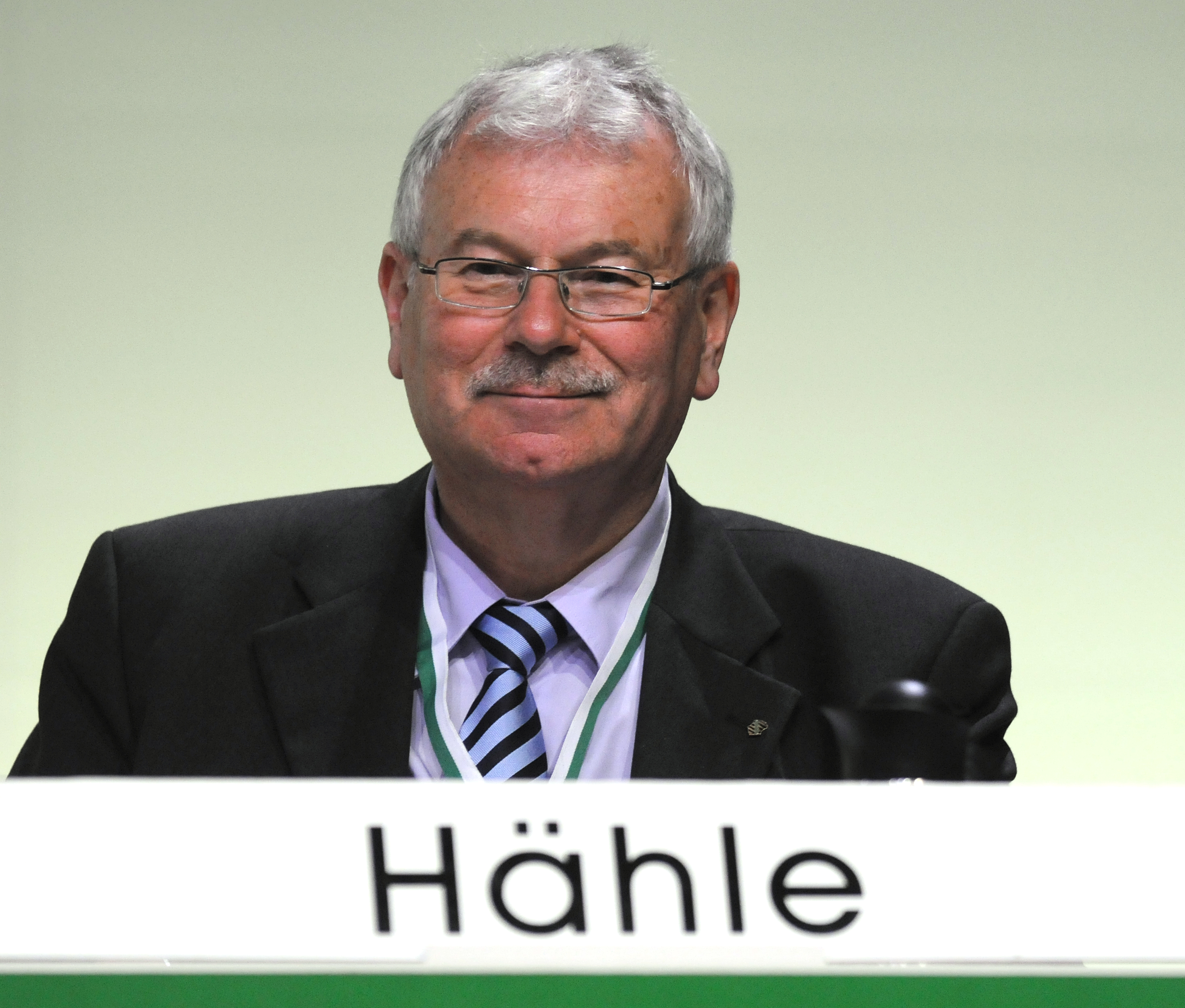 Fritz Hähle beim 22. Landesparteitag der Sächsischen Union am 24. Mai 2008 in Zwickau